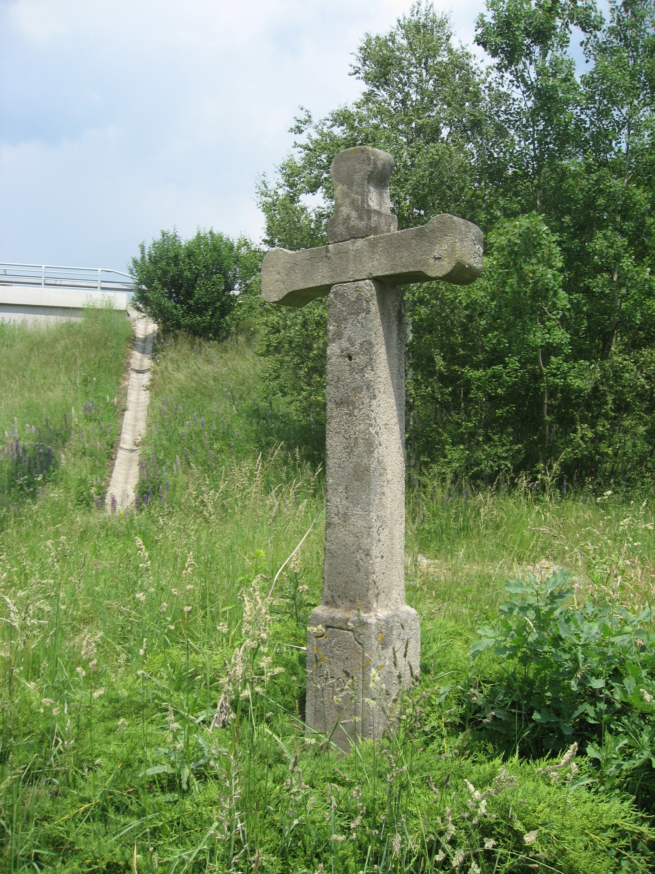 Slavníč, kříž poblíž dálnice z konce 18. století